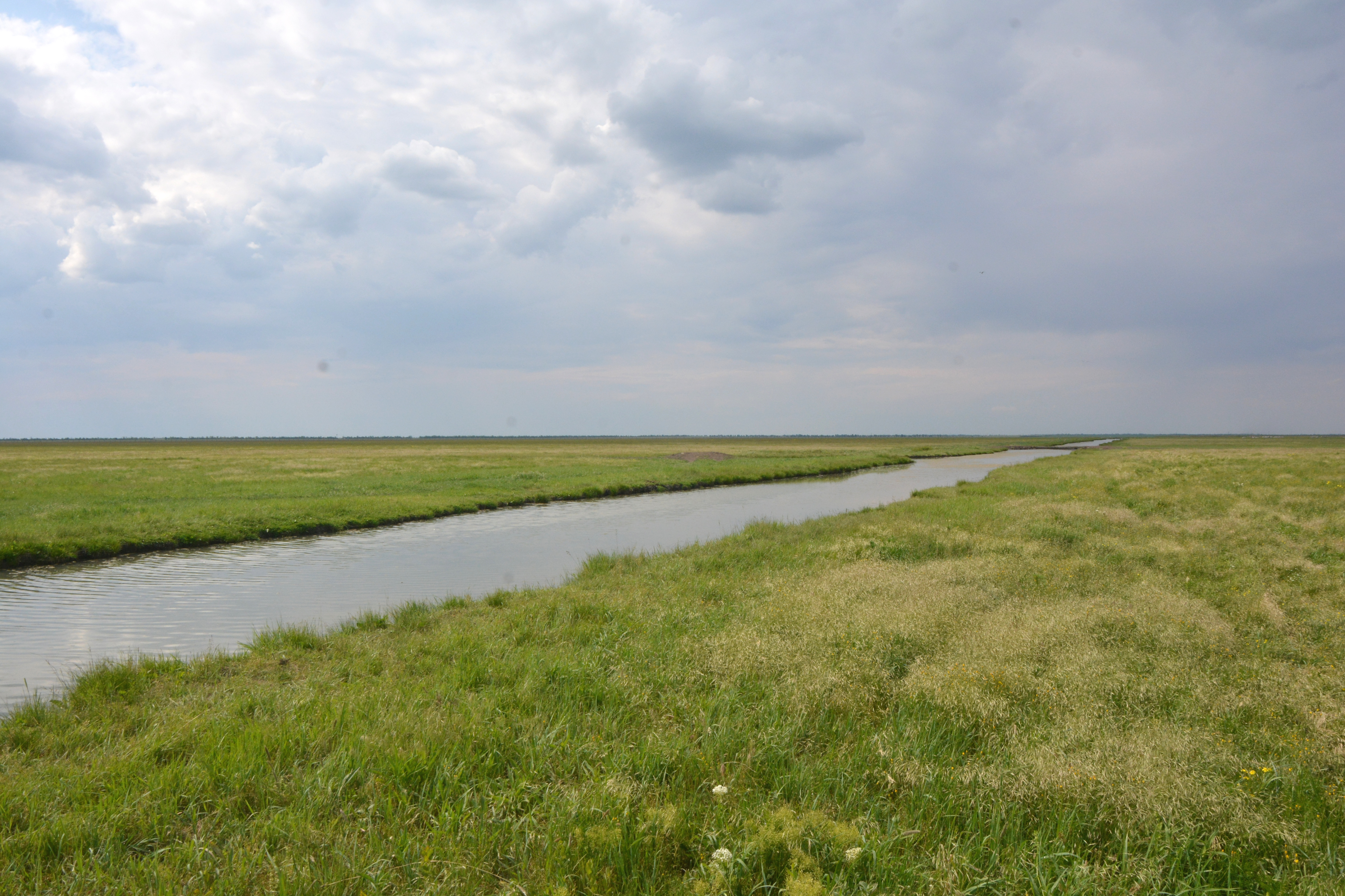 «Асканія-Нова» ім. Ф. Е. Фальц-Фейна, :uk:Чаплинський район, смт Асканія-Нова, вул. Фрунзе,13